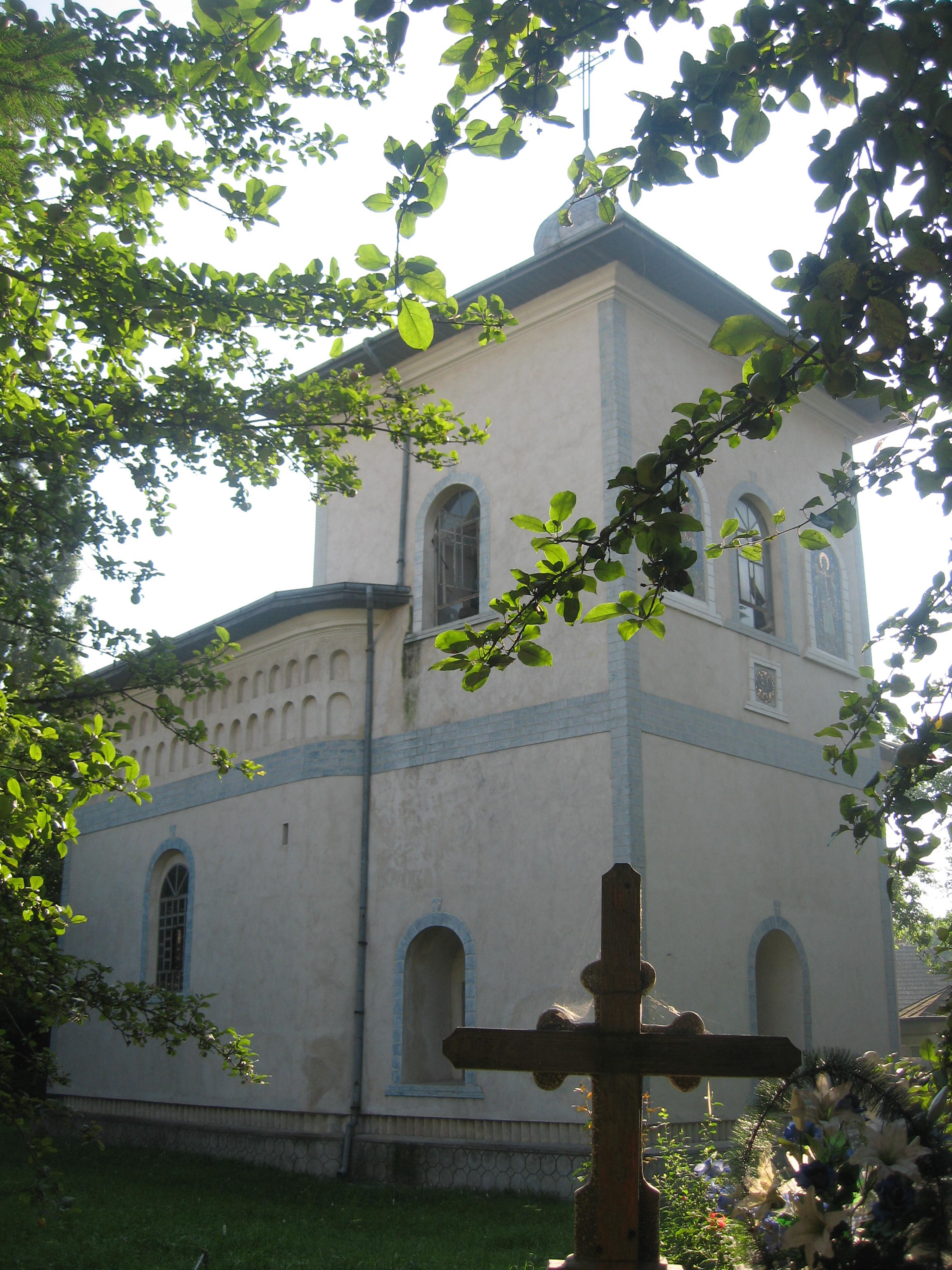 Biserica Sf. Voievozi din Pascani